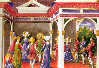 Bible de Borso d'Este, détail de danseurs et de musiciens, Taddeo Crivelli, (Biblioteca Estense, Modène)